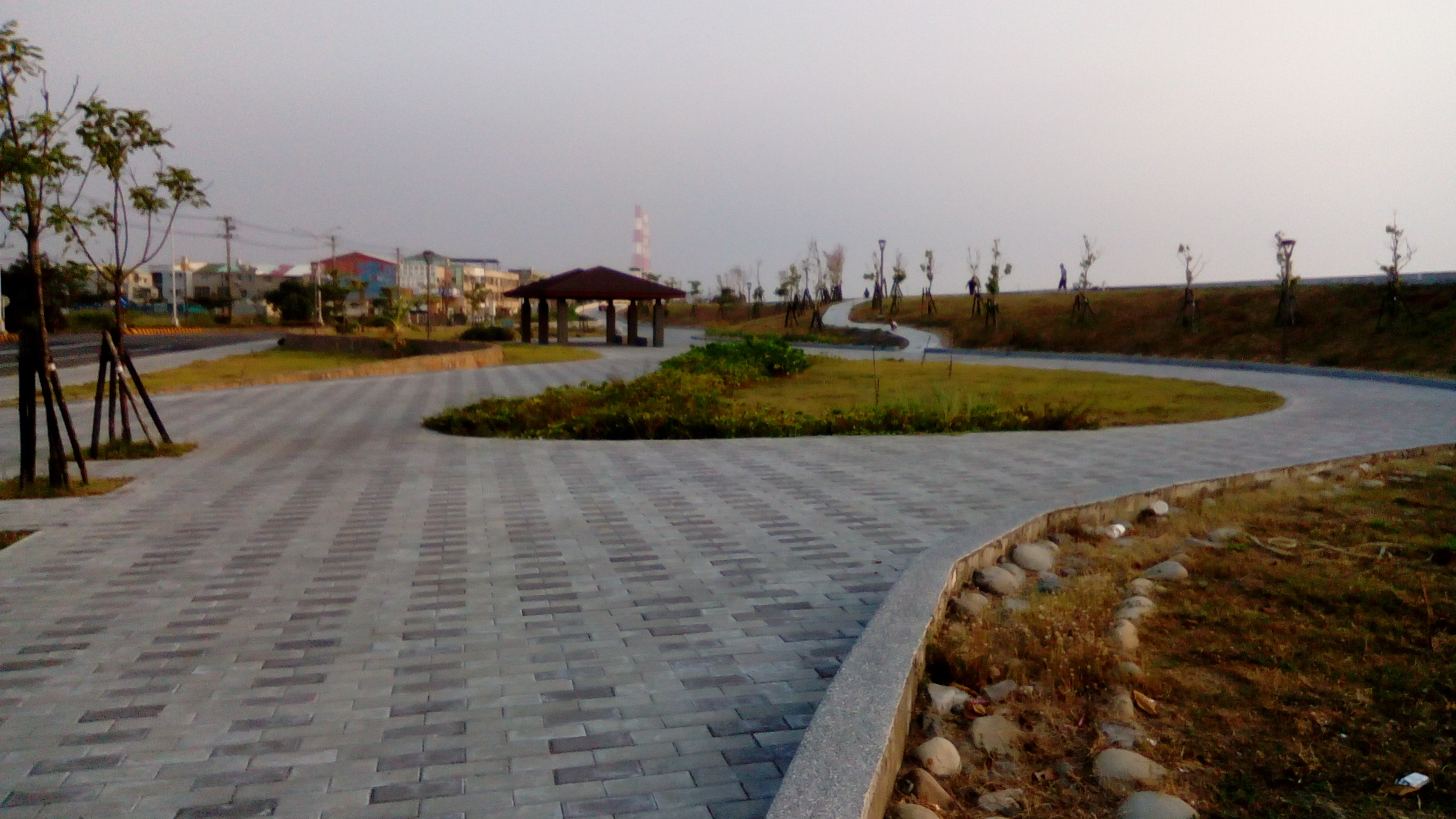 同上